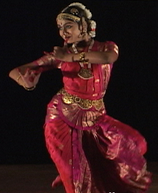 Bharatanatyam